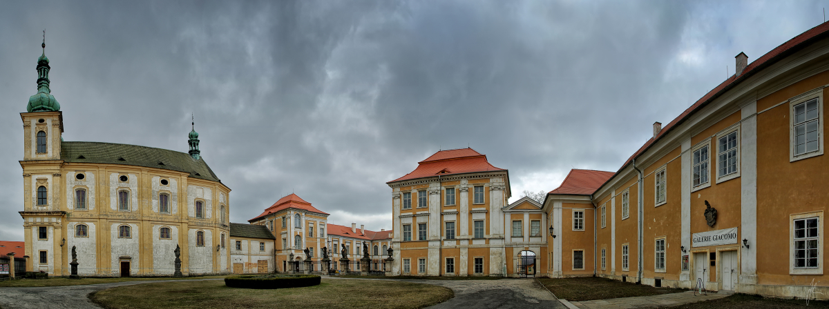 Zámek Duchcov, Duchcov 202